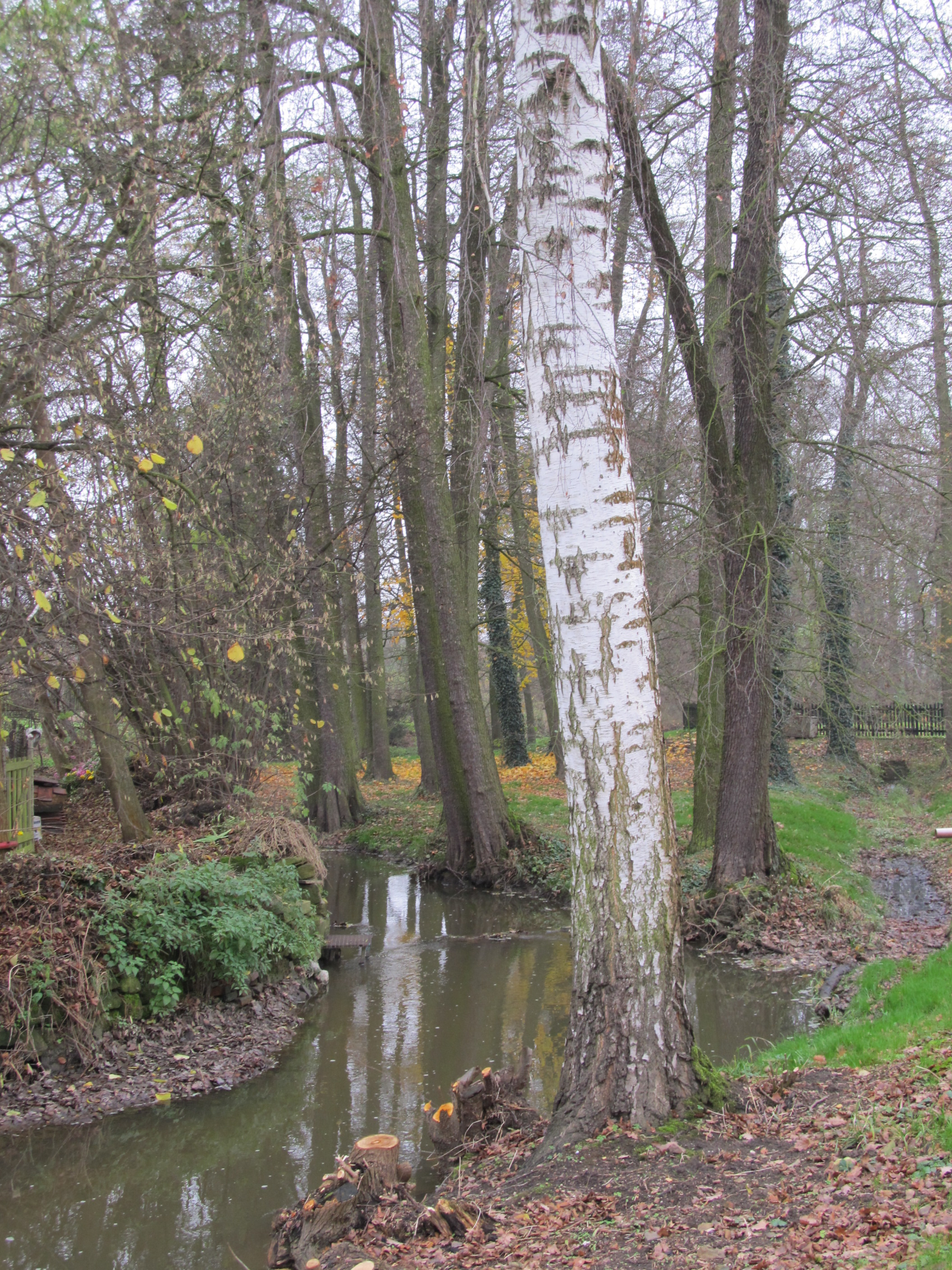 Dnešický potok ve Vstiši